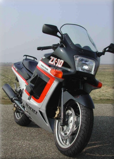 Kawasaki zx10 uit 1988 137 pk